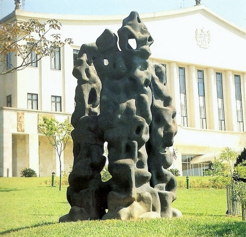 Colunas, 1975/76 (bronze; 410 x 275 cm). Felícia Leirner (1904-1996)